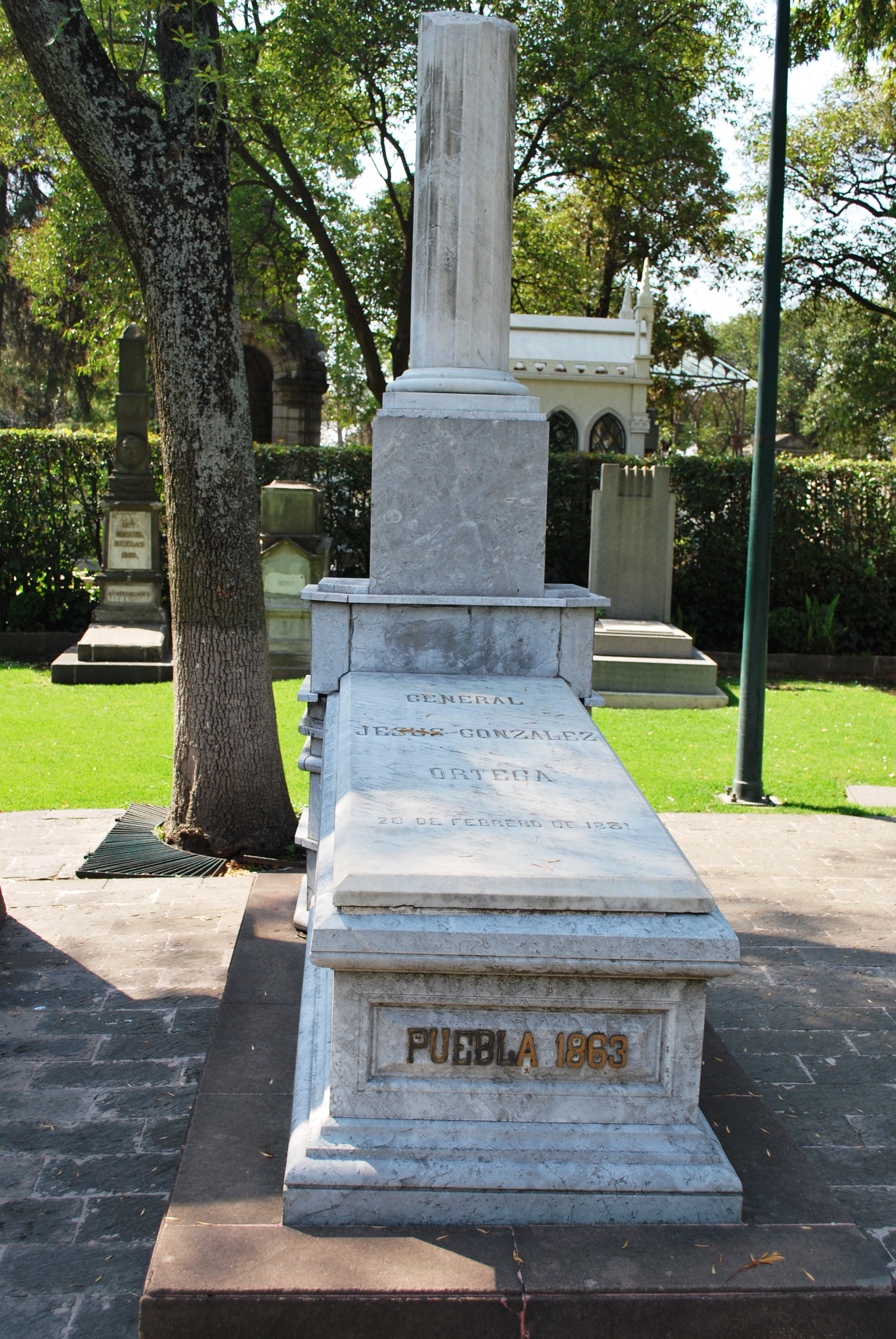 General Jesus Gonzalez Ortega tomb located in the Panteón Civil de Dolores Cemetery in Mexico City.